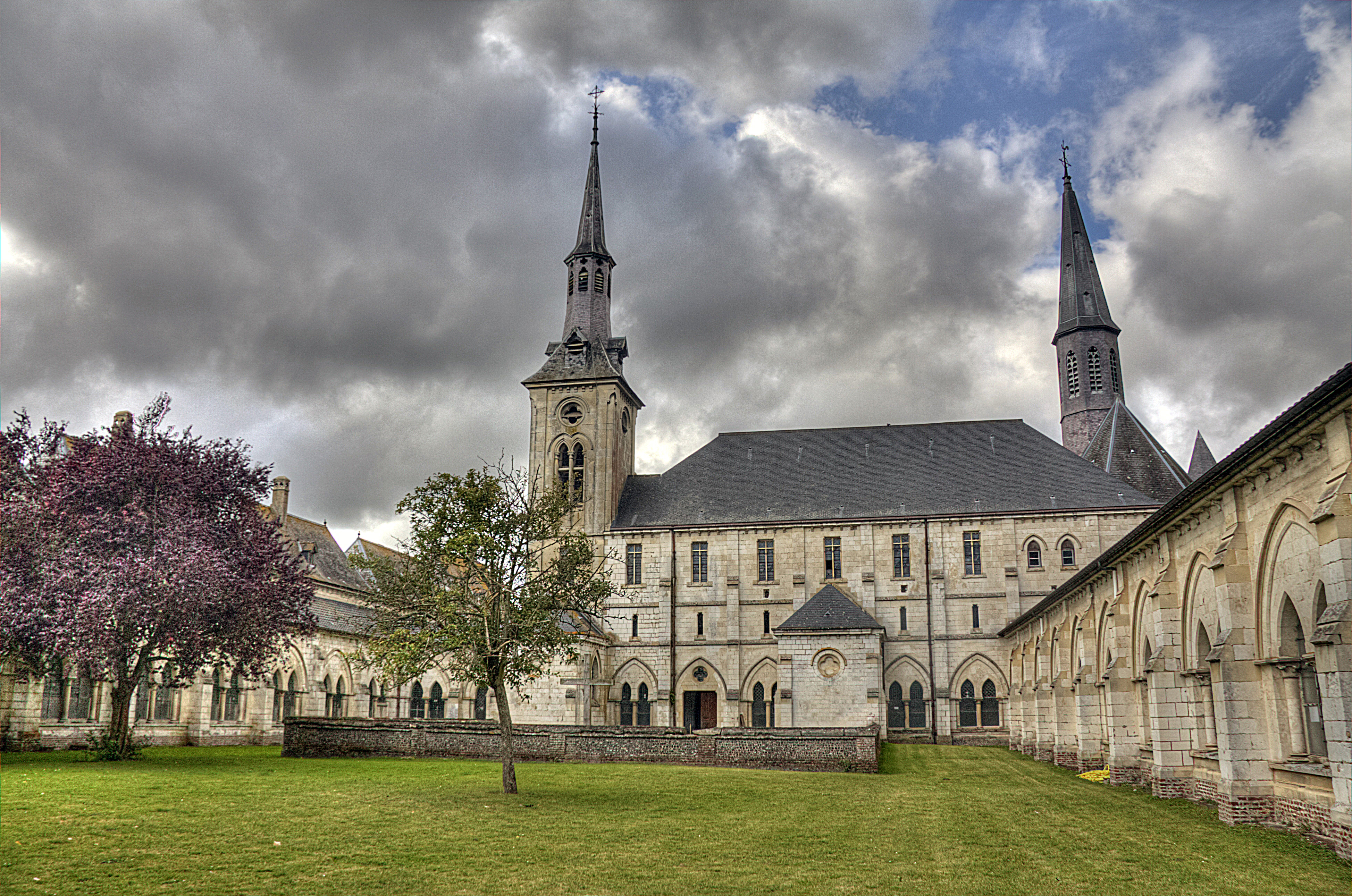 L'ancien verger de la chartreuse Notre Dame des prés de Neuville sous Montreuil